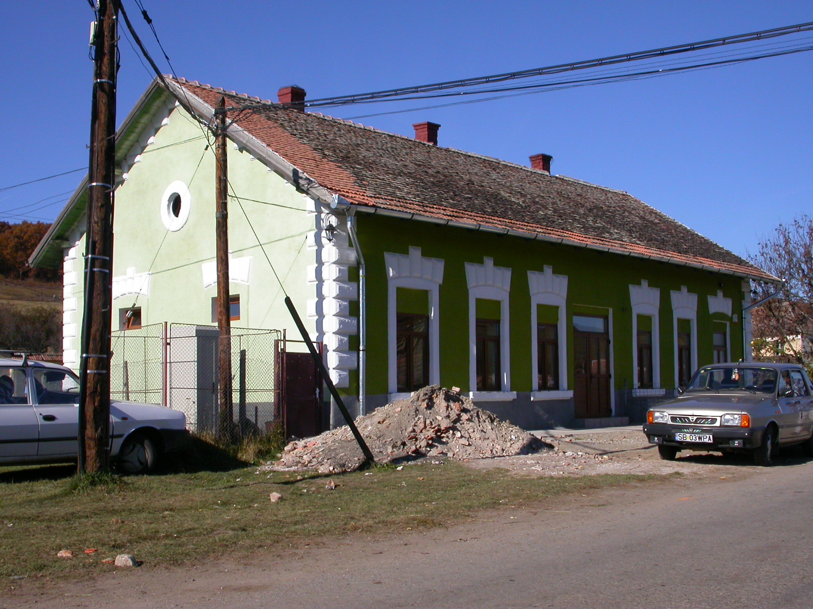 Halta Hendorf, (veche denumire a satului Brădeni), 1898 - 1910 01